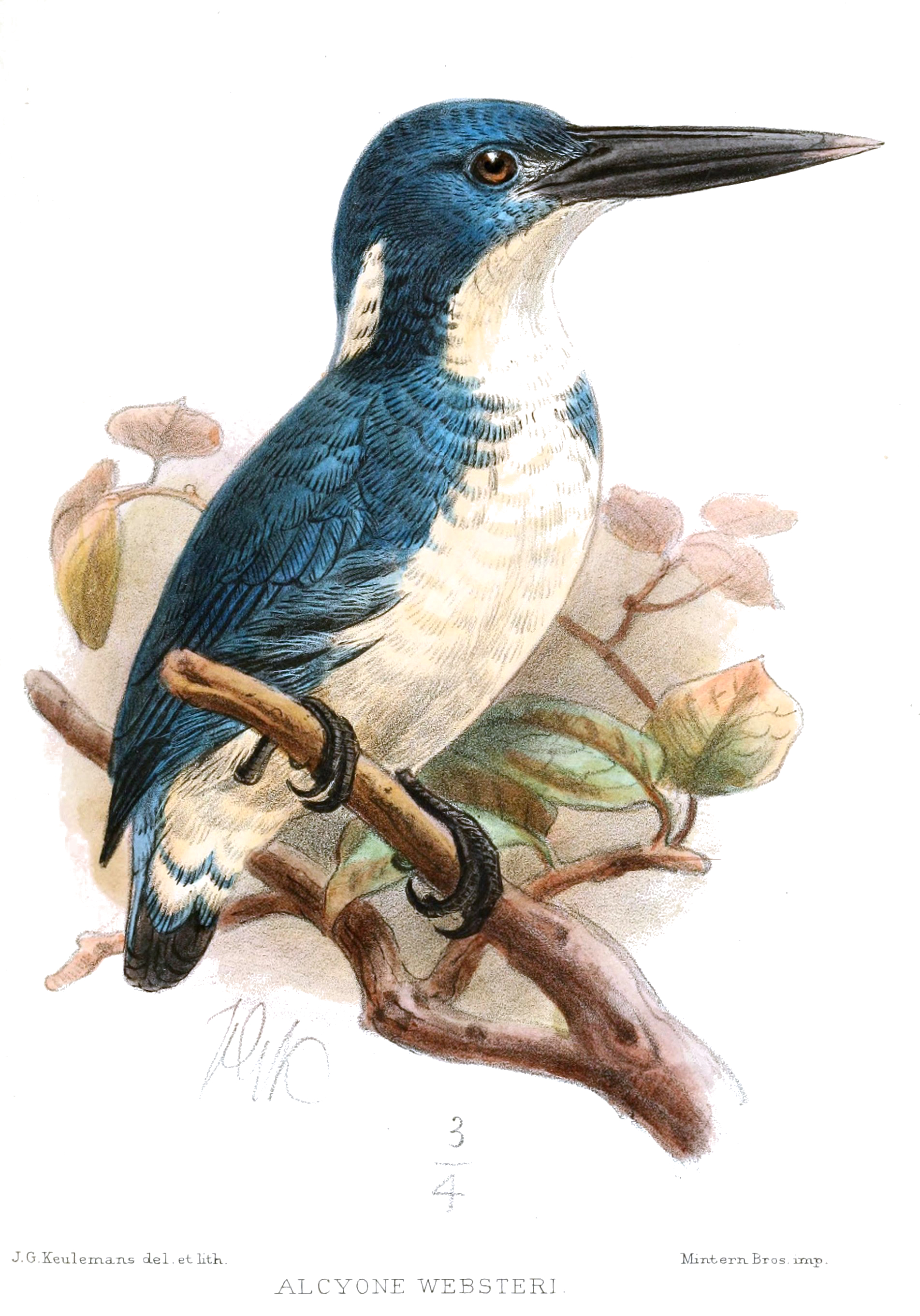 Alcyone websteri (=Alcedo websteri)